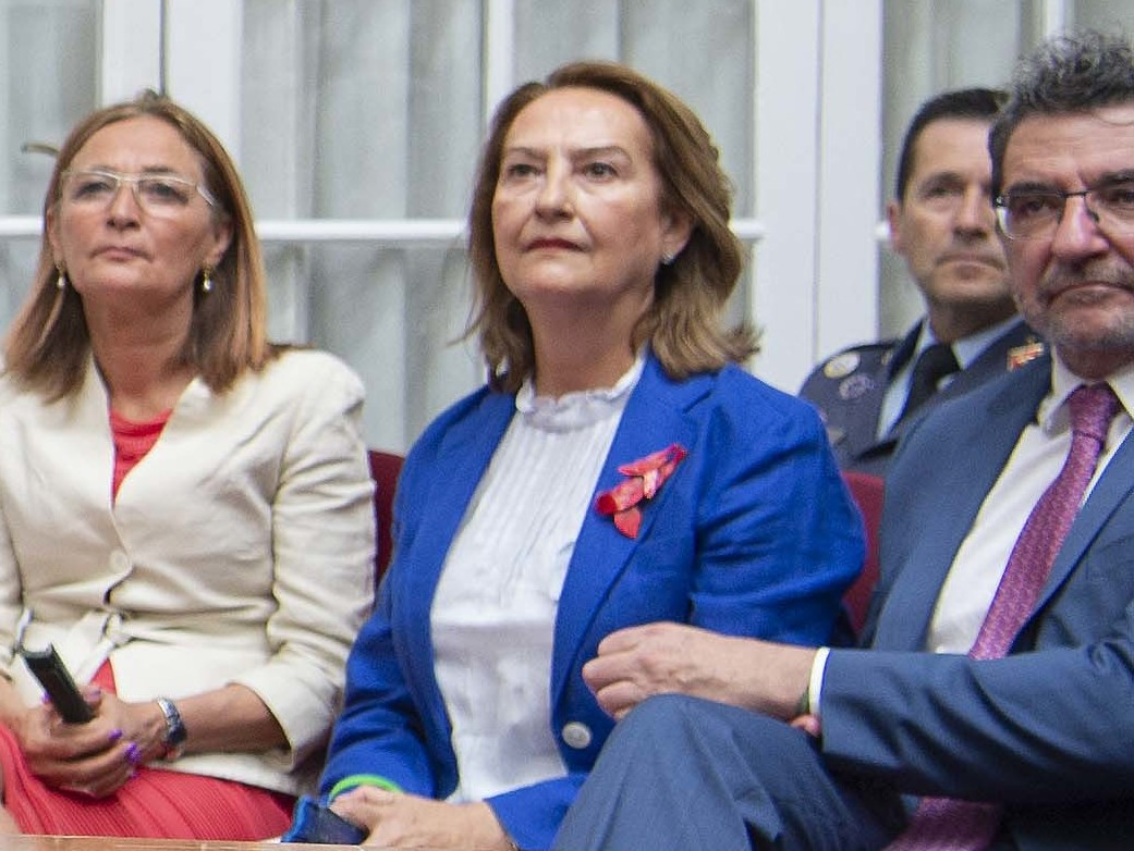 Toma de posesión del delegado del Gobierno